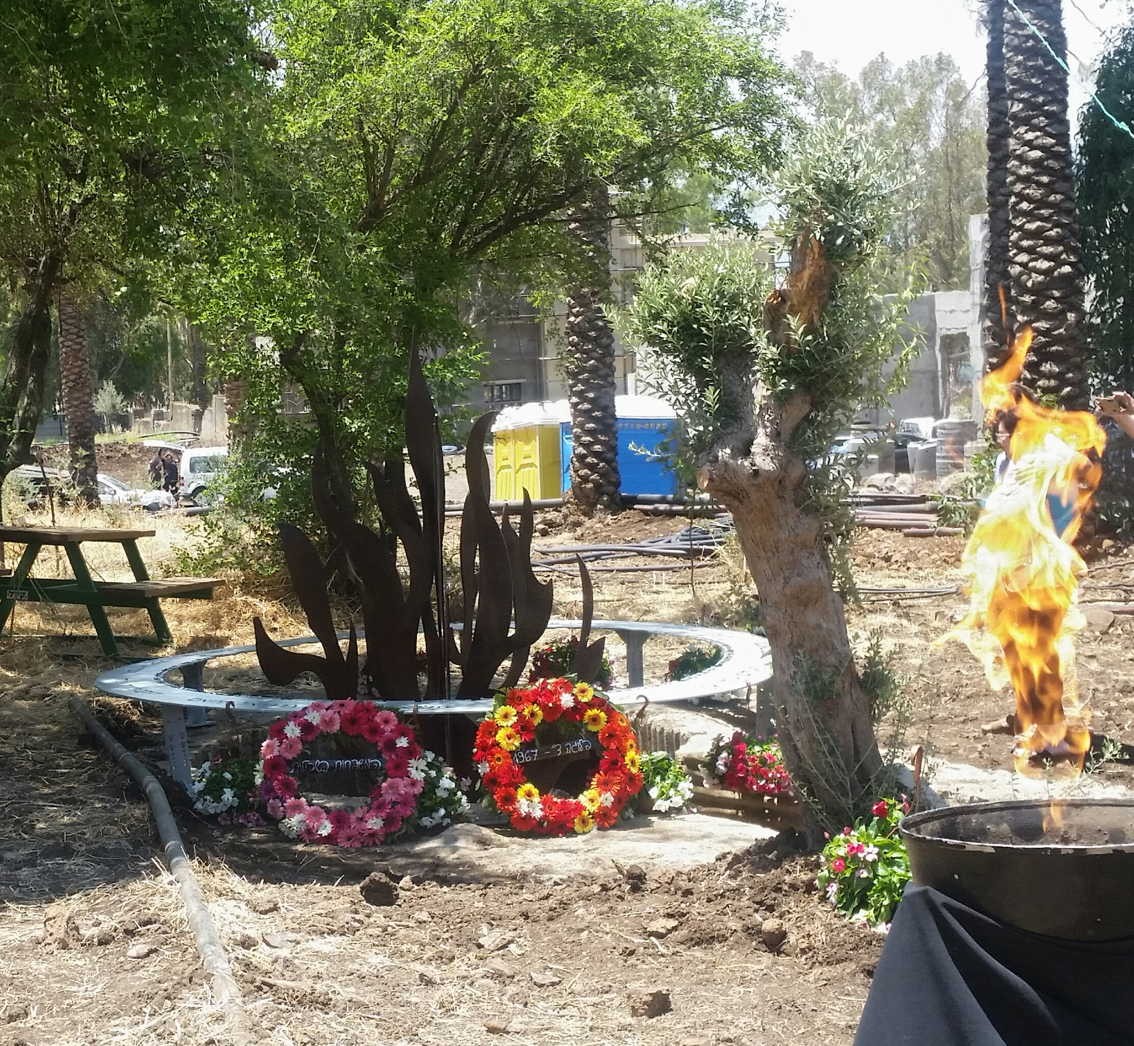 A monument commemorating 11 Golani soldiers in the Golan Heights